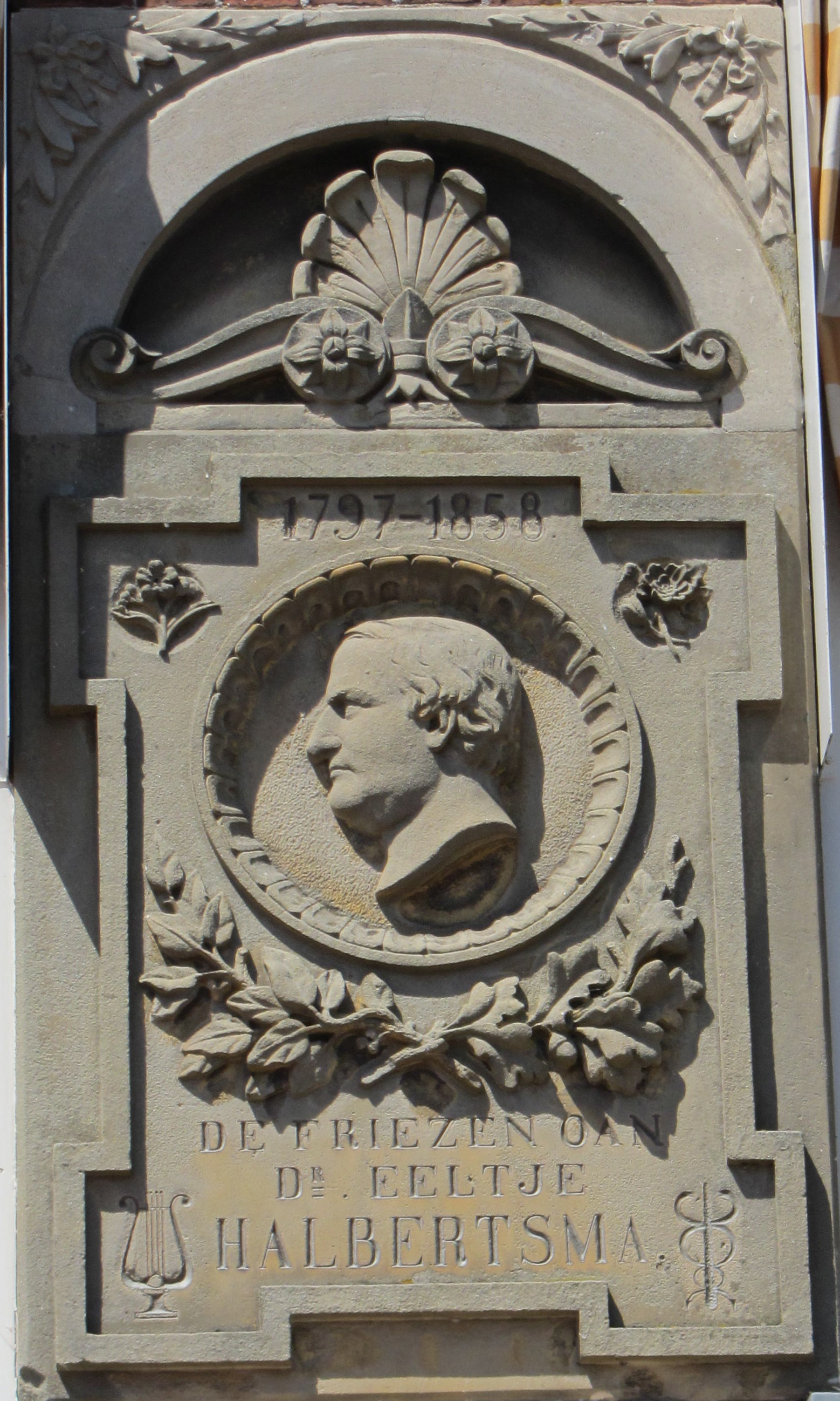 Willem Molkenboer,1875.